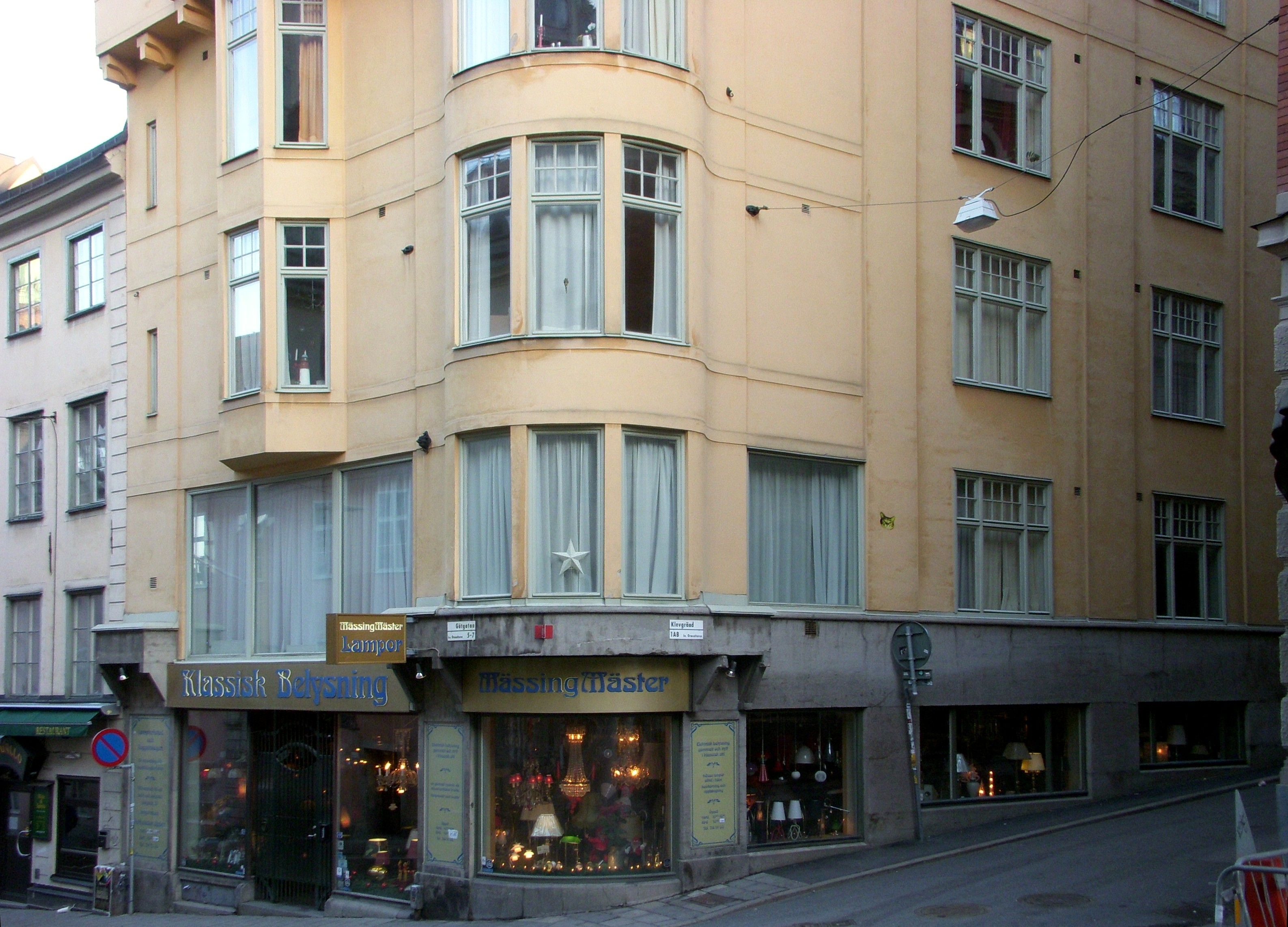 Hörnhuset Götgatan 7 och Klevgränd 1A i Stocknolm